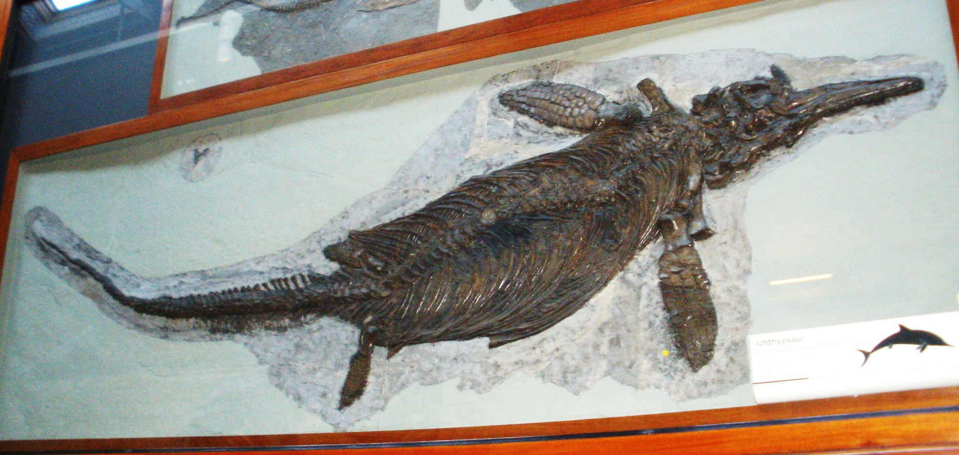 Fossil of Ichthyosaurus, an extinct reptile-- Took the photo at Natural History Museum, London